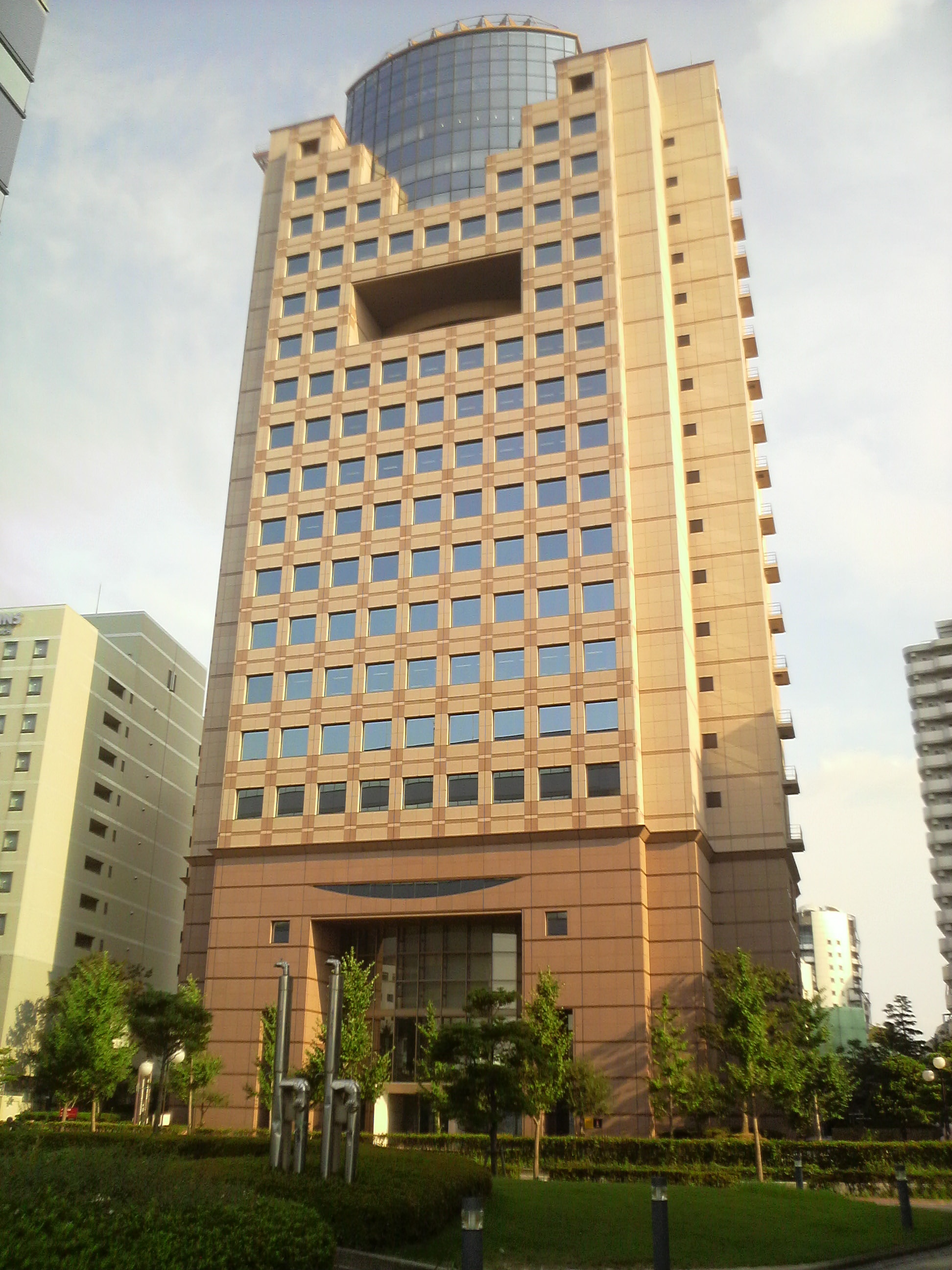 福岡市早良区百道浜にあるＭタワー